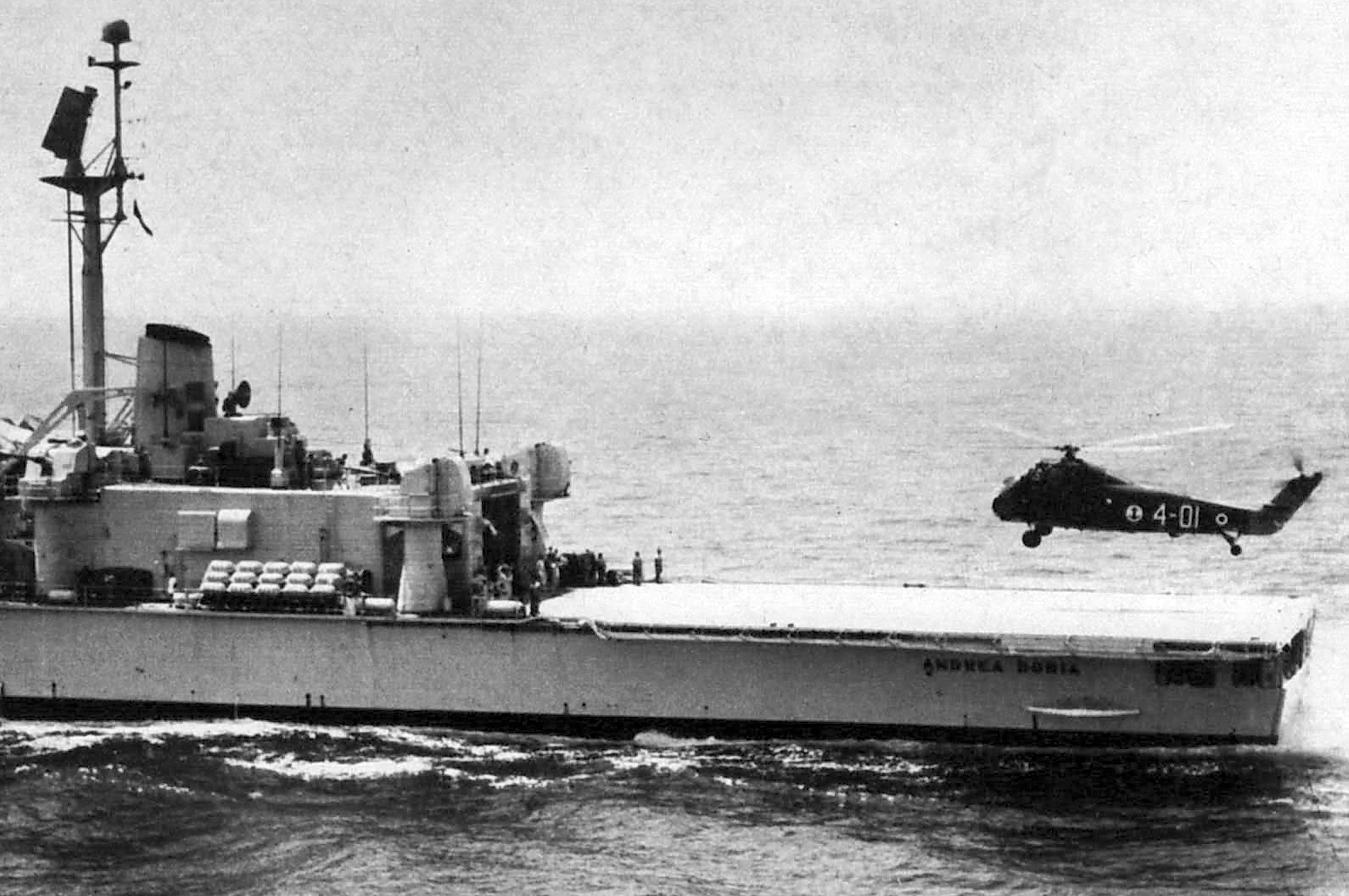 appontaggio di un elicottero SH-34J a bordo dell'incrociatore Andrea Doria. Gli esemplari codificati 4-01 e 4-02 risulterebbero distrutti nel tornado che colpì l'aeroporto di Catania Fontanarossa, tuttavia dalla constatazione, documentata da diverse immagini fotografiche, i due esemplari codificati 4-01 e 4-02 sono stati impiegati dopo il 31 ottobre 1964 a bordo degli incrociatori della classe “Doria”